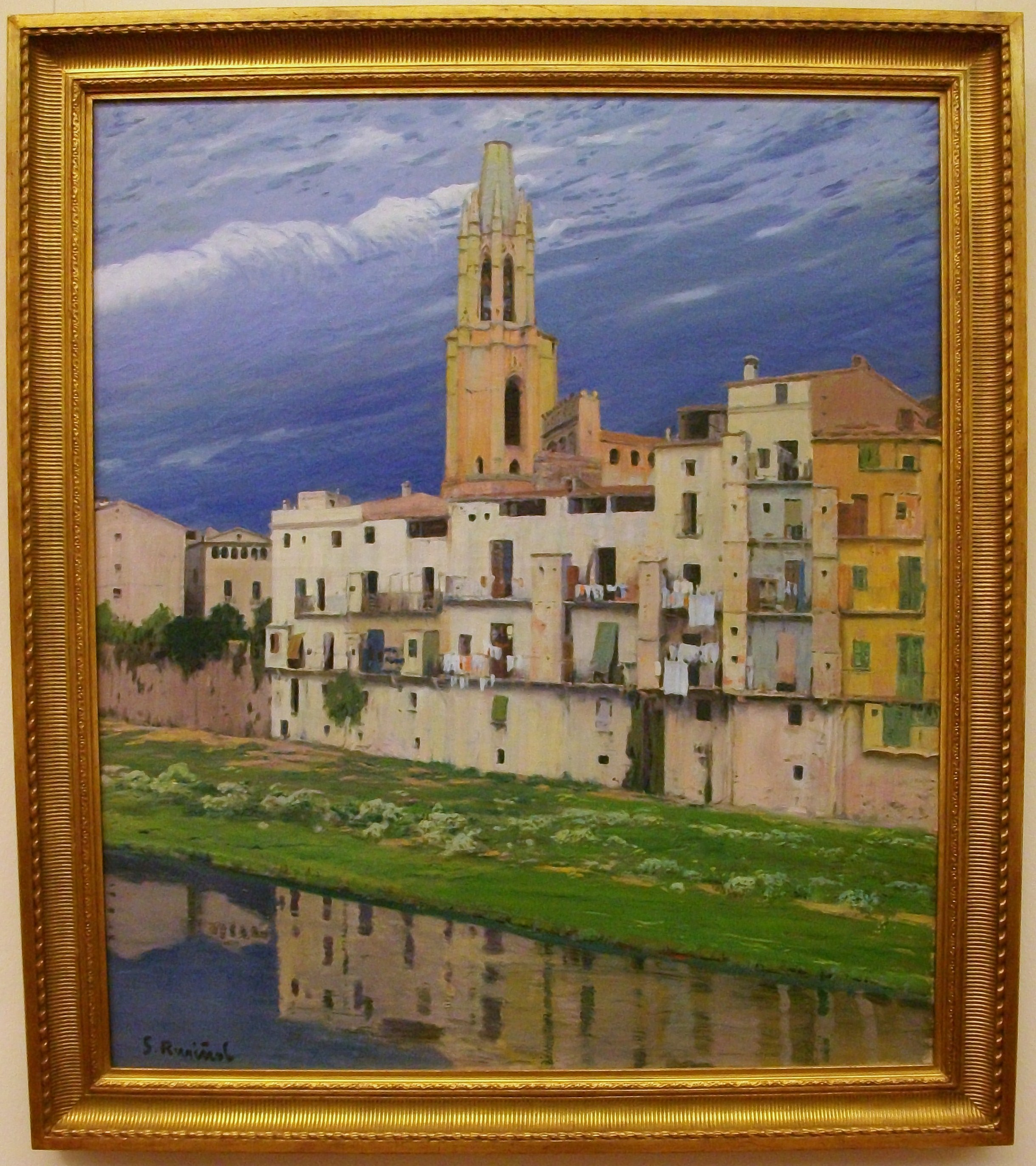 Catalan: El riu Onyar al seu pas per Girona